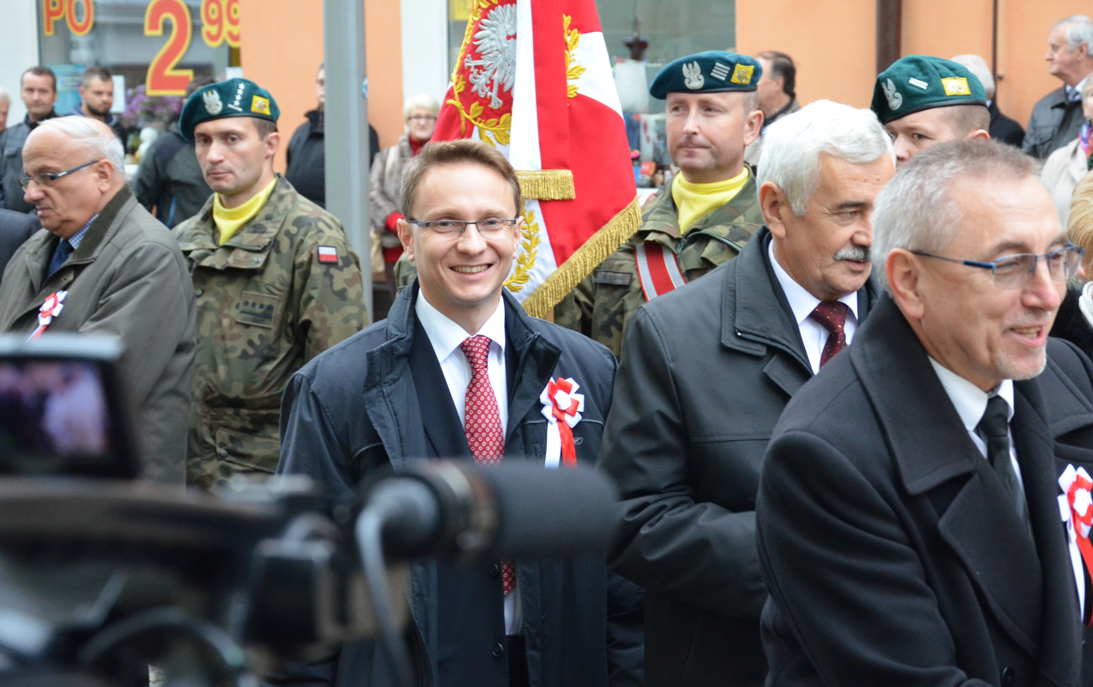 Feierlichkeiten zum Unabhängigkeitstag in Sanok